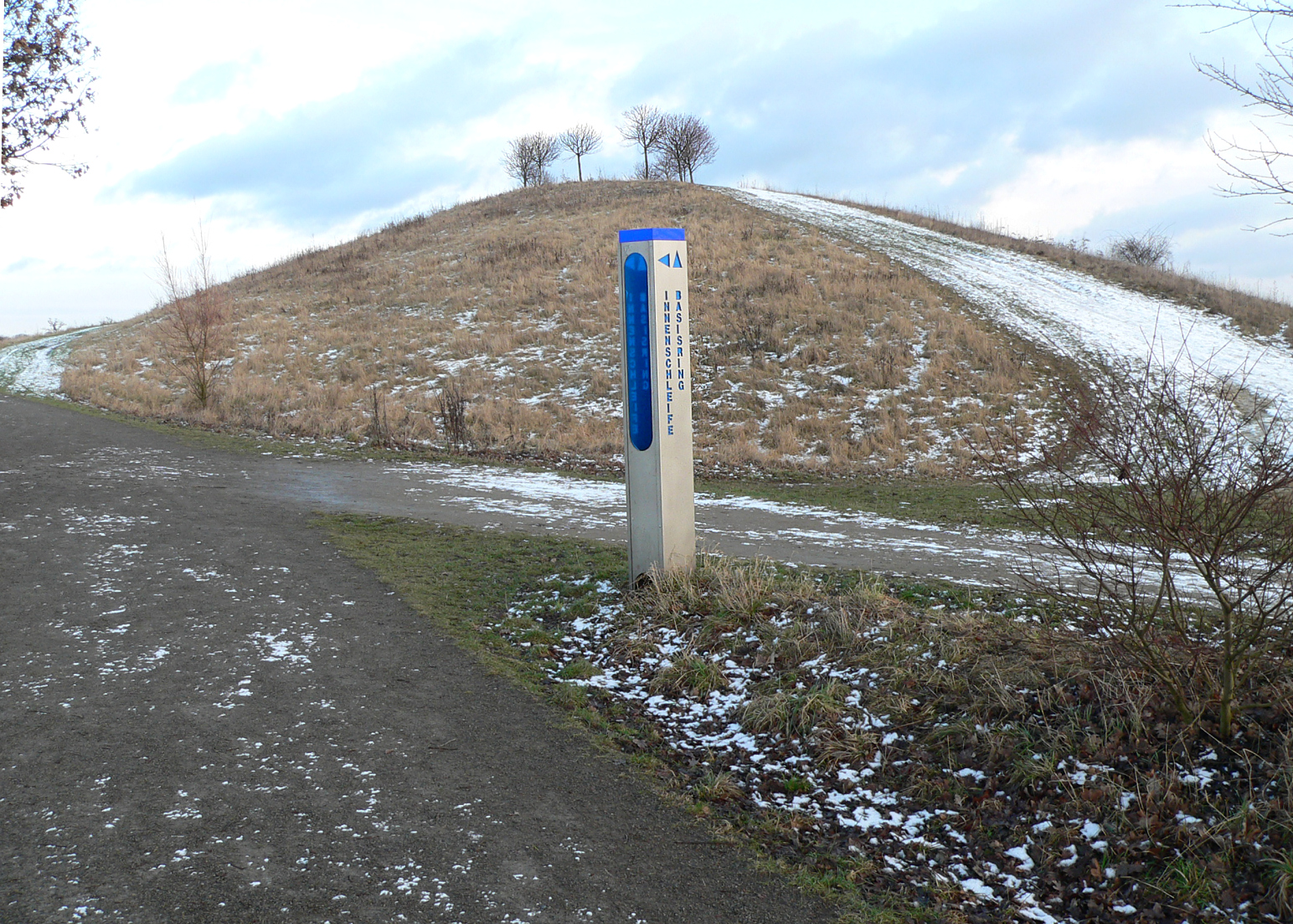 Säule am Kreuzungspunkt von Innenschleife und Basisring am Kronsberg